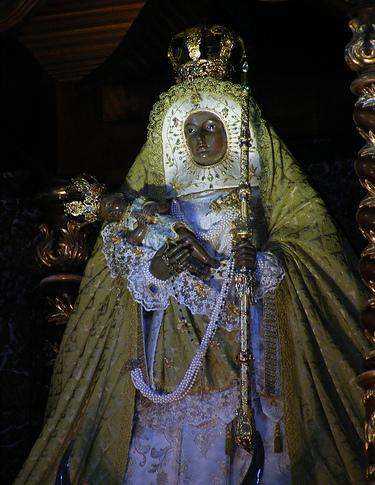 Virgen de Candelaria con manto verde